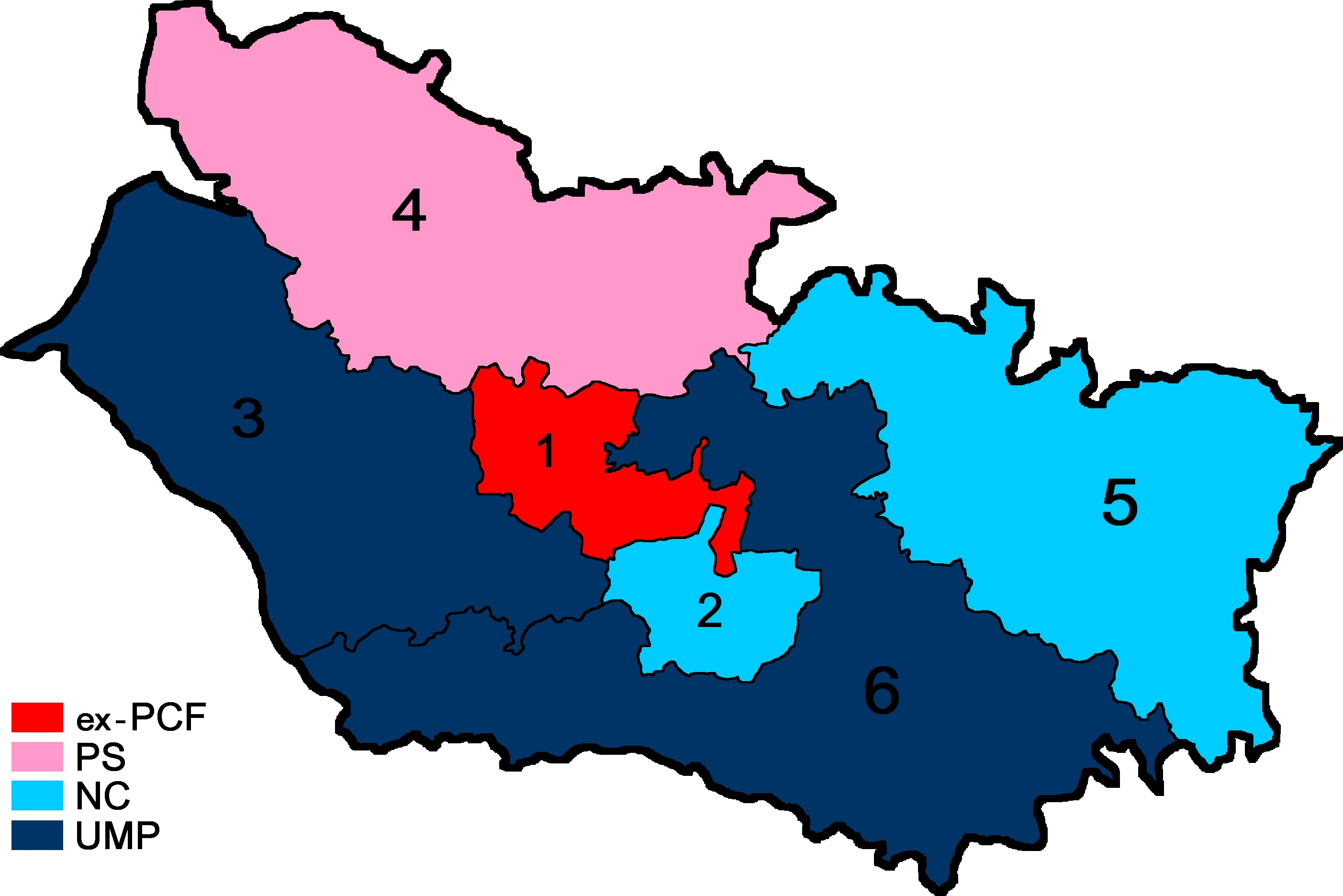 Députés de la Somme 2007-2012